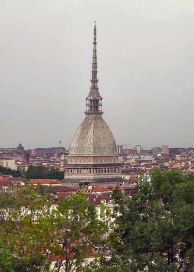 La Mole Antonelliana a Torino